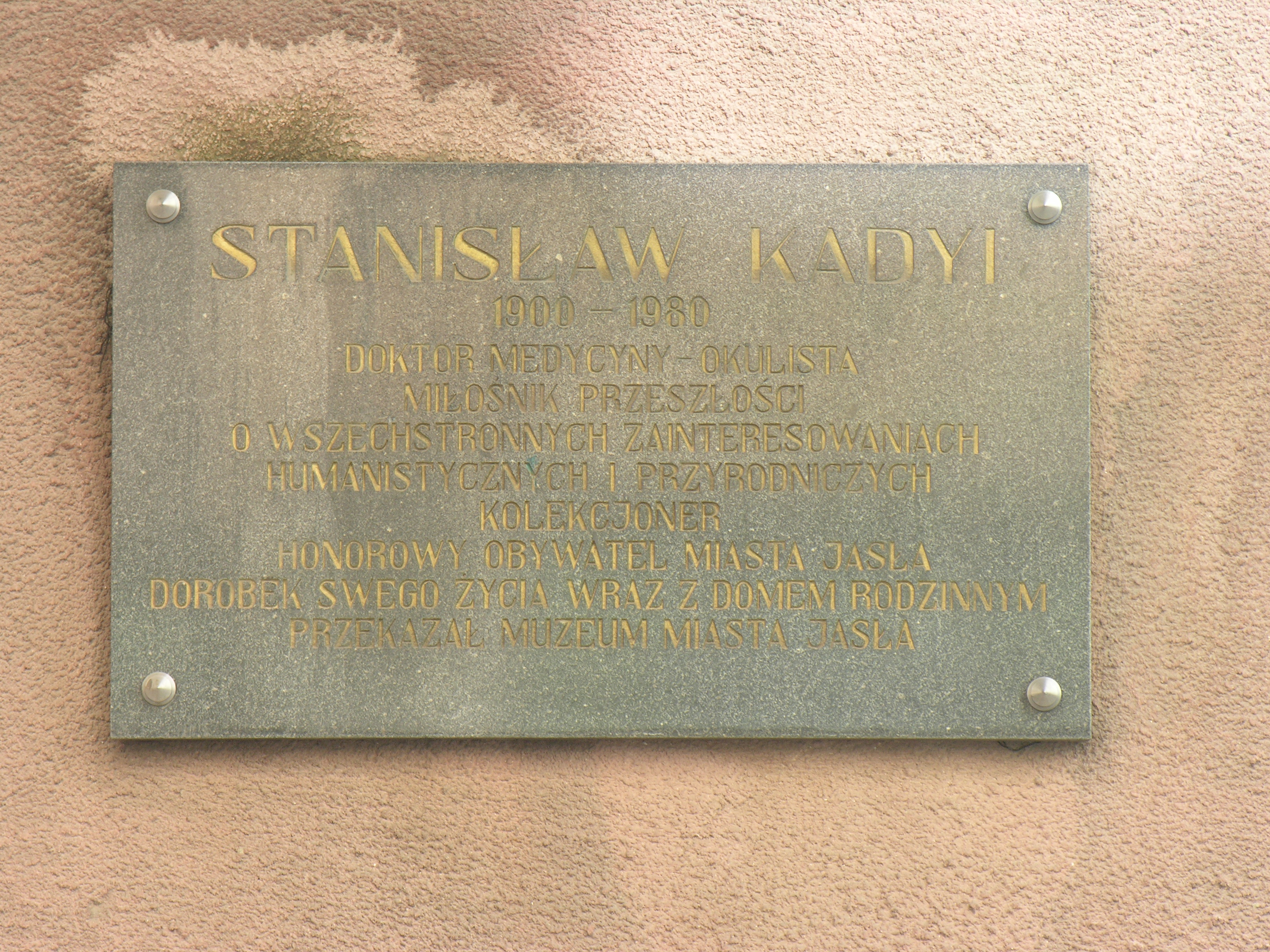 Tablica ku czci Stanisława Kadyi w Jaśle, ul. Kadyiego 11